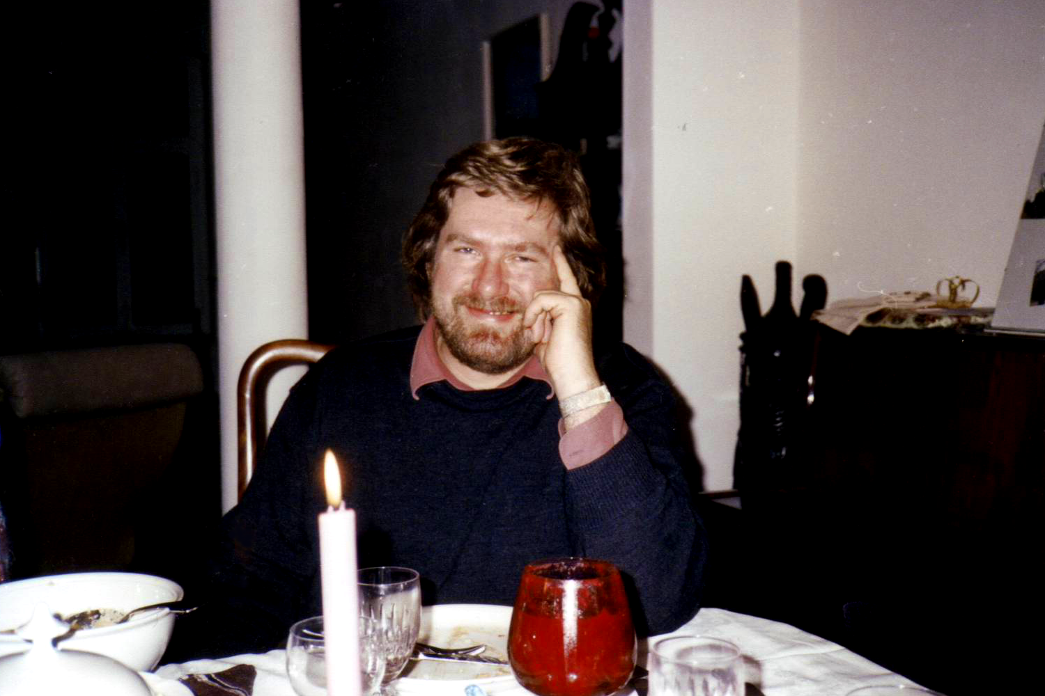 la germana ĵurnalisto kaj politikisto Heinz Suhr